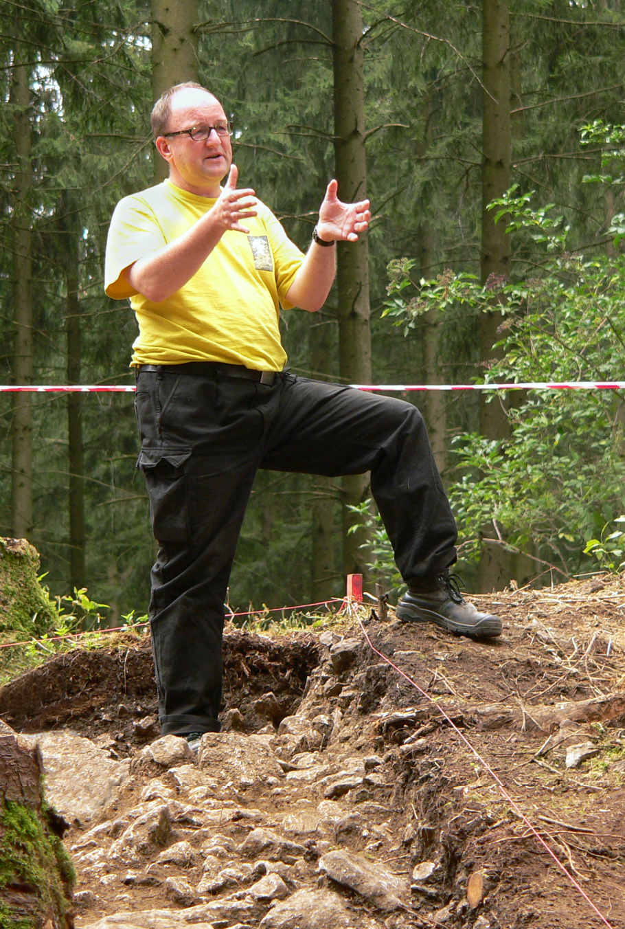 Michael Meyer am Harzhorn, unter dessen Leitung die Ausgrabungen des römischen Schlachtfeld bei Kalefeld stattfinden